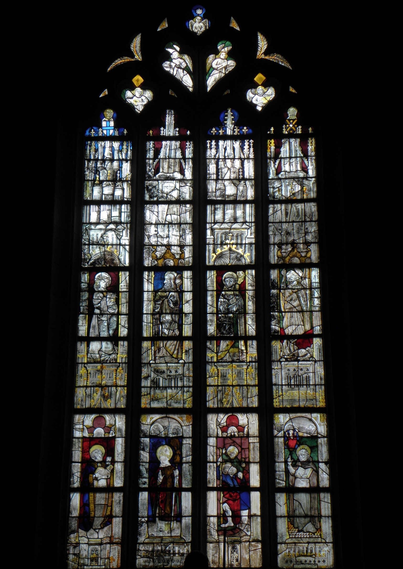 Baie 10 de la basilique Notre-Dame-du-Roncier de Josselin (56). Datation: v.1470-1480 et v.1890-1895. Maître-verrier: atelier Hucher et Carmel du Mans. Description: 1er registre: Saint-Pierre, Saint évêque, Saint-Christophe et Saint-Vincent-Ferrier; 2ème registre: Saint-Jean l'évangéliste, Saint-Jacques-le-Majeur, Saint-Bernard et Saint-Michel; Armes de Mgr Jean-Marie Bécel et ?; Tympan: anges musiciens.